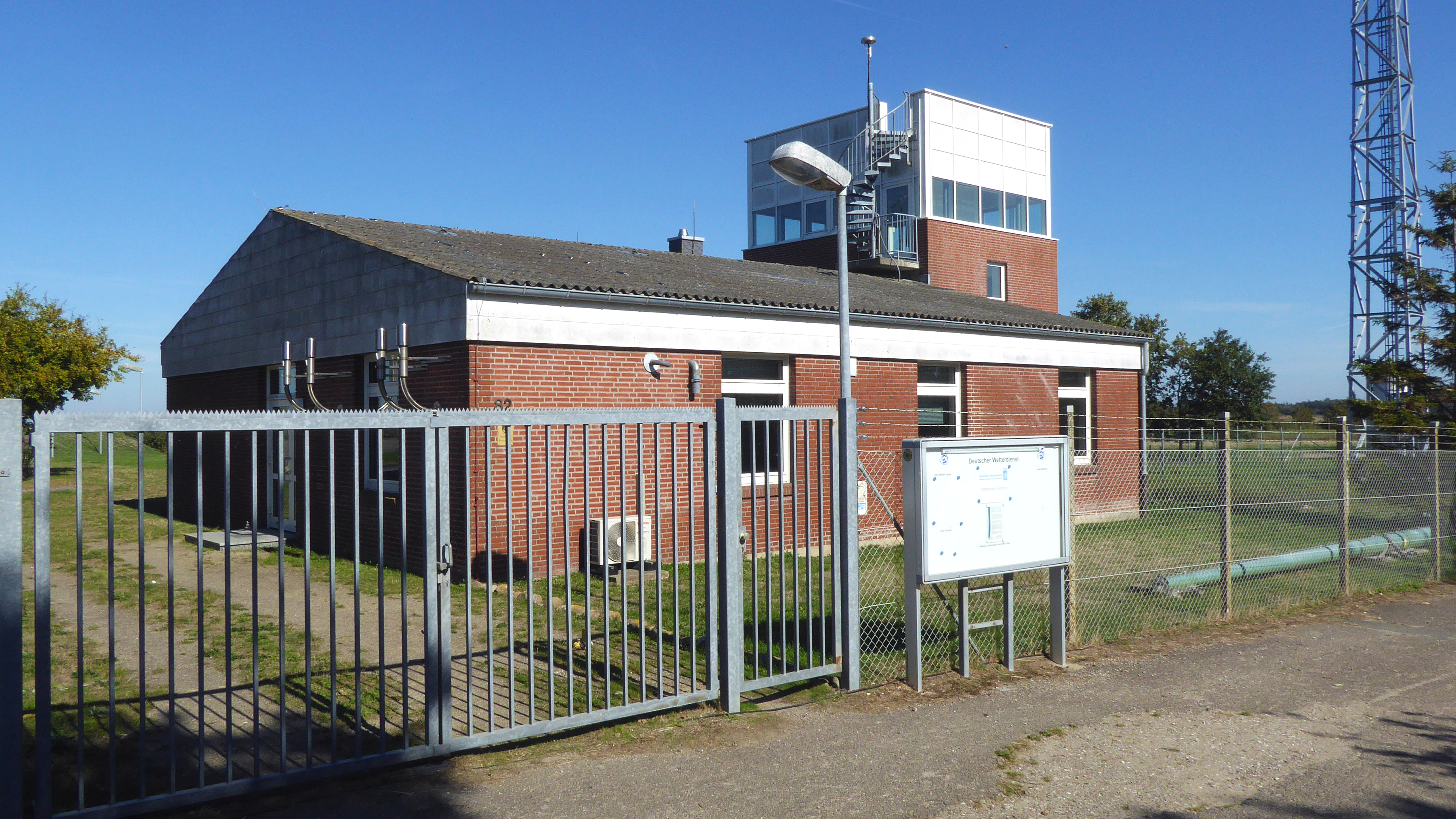 DWD Deutscher Wetterdienst Wetterstation Westermarkelsdorf in Norden der Insel Fehmarn Schleswig-Holstein Deutschland, der DWD ist eine Bundesanstalt und dem BMVI zugeordnet - Foto 2018 Wolfgang Pehlemann P1270107. An der Vorderseite des Gebäudes sichtbar ein Klimagerät - wird damit unser Klima gemacht...?